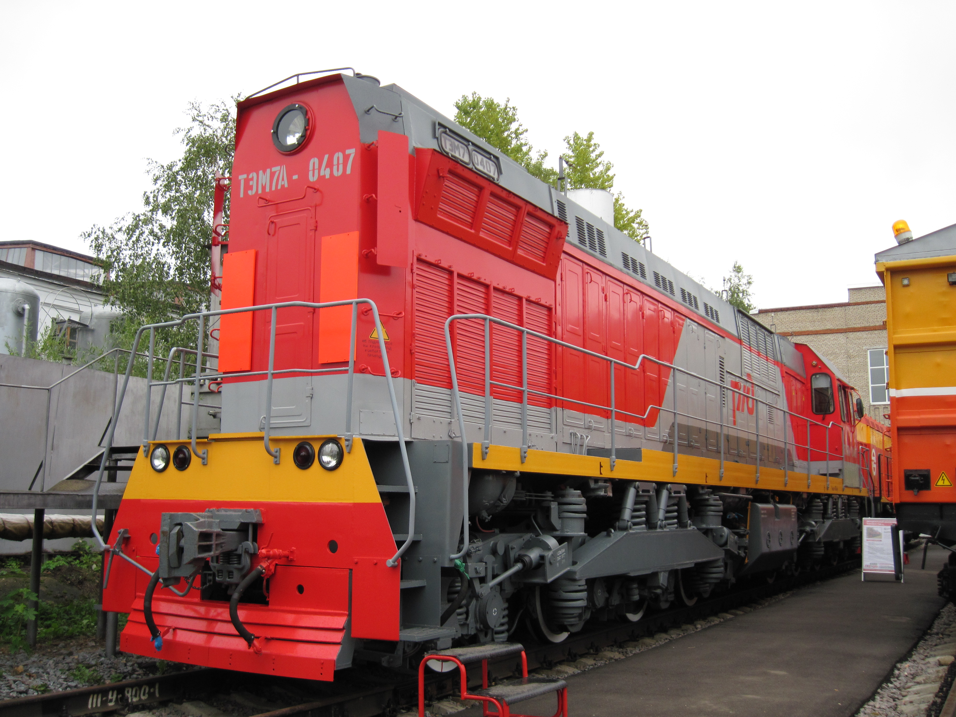 Тепловоз ТЭМ7А-0407 на выставке Экспо-1520 в 2011 году на территории депо ВНИИЖТ в Щербинке